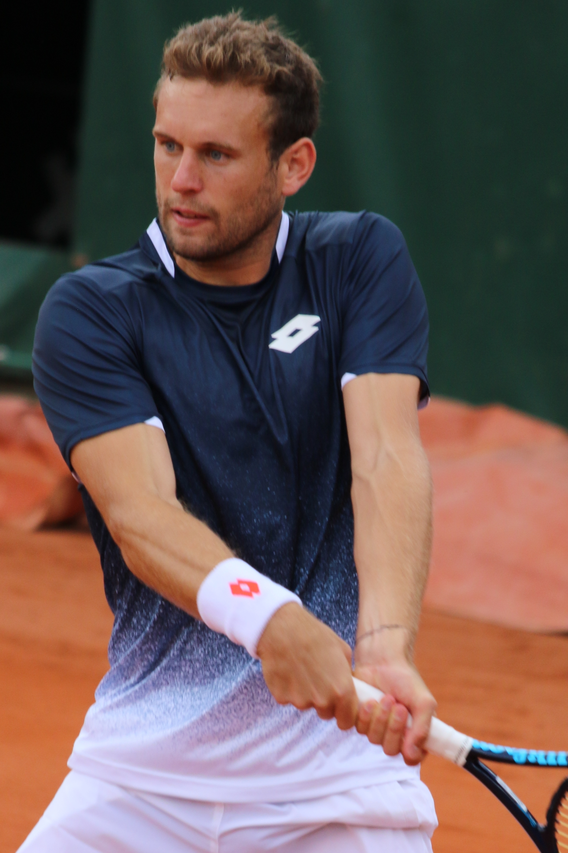 Bourgue RG19 (11)